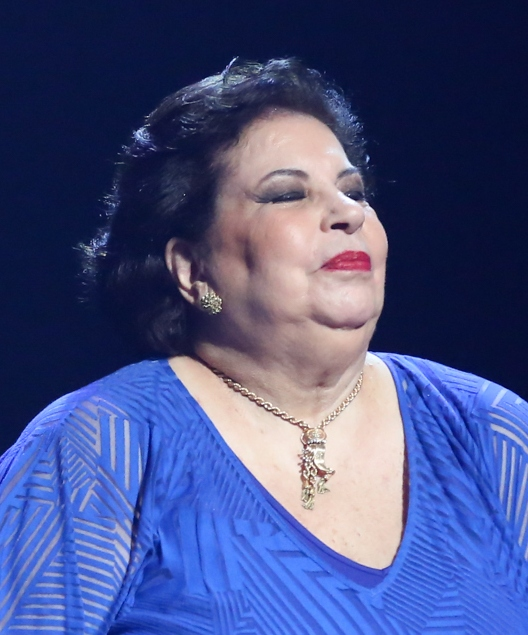 Nana Caymmi - 26° Prêmio da Música Brasileira 2015, no Theatro Municipal, no Centro do Rio de Janeiro/RJ. (10/06/15) Foto: Roberto Filho/Divulgacão